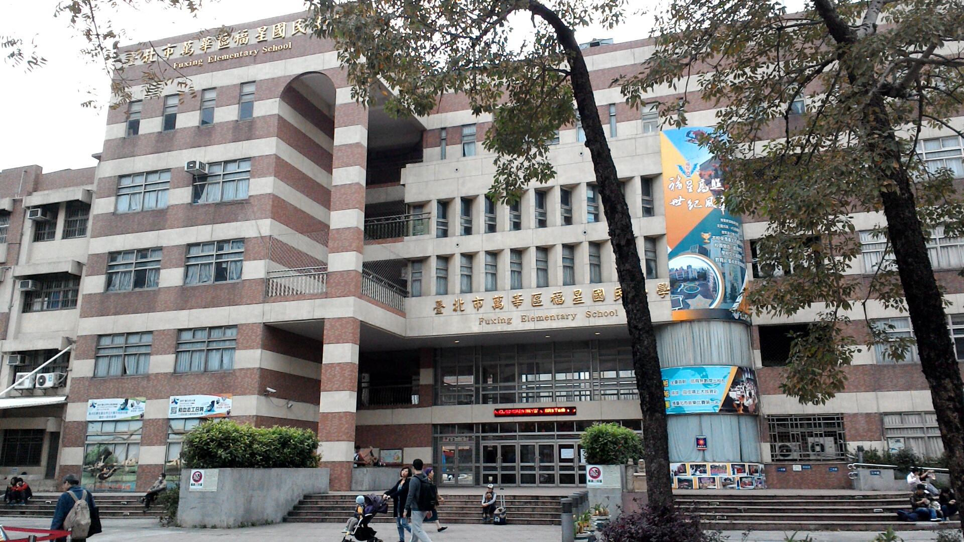 台北市萬華區福星國民小學,台北市萬華區西門次分區福星里